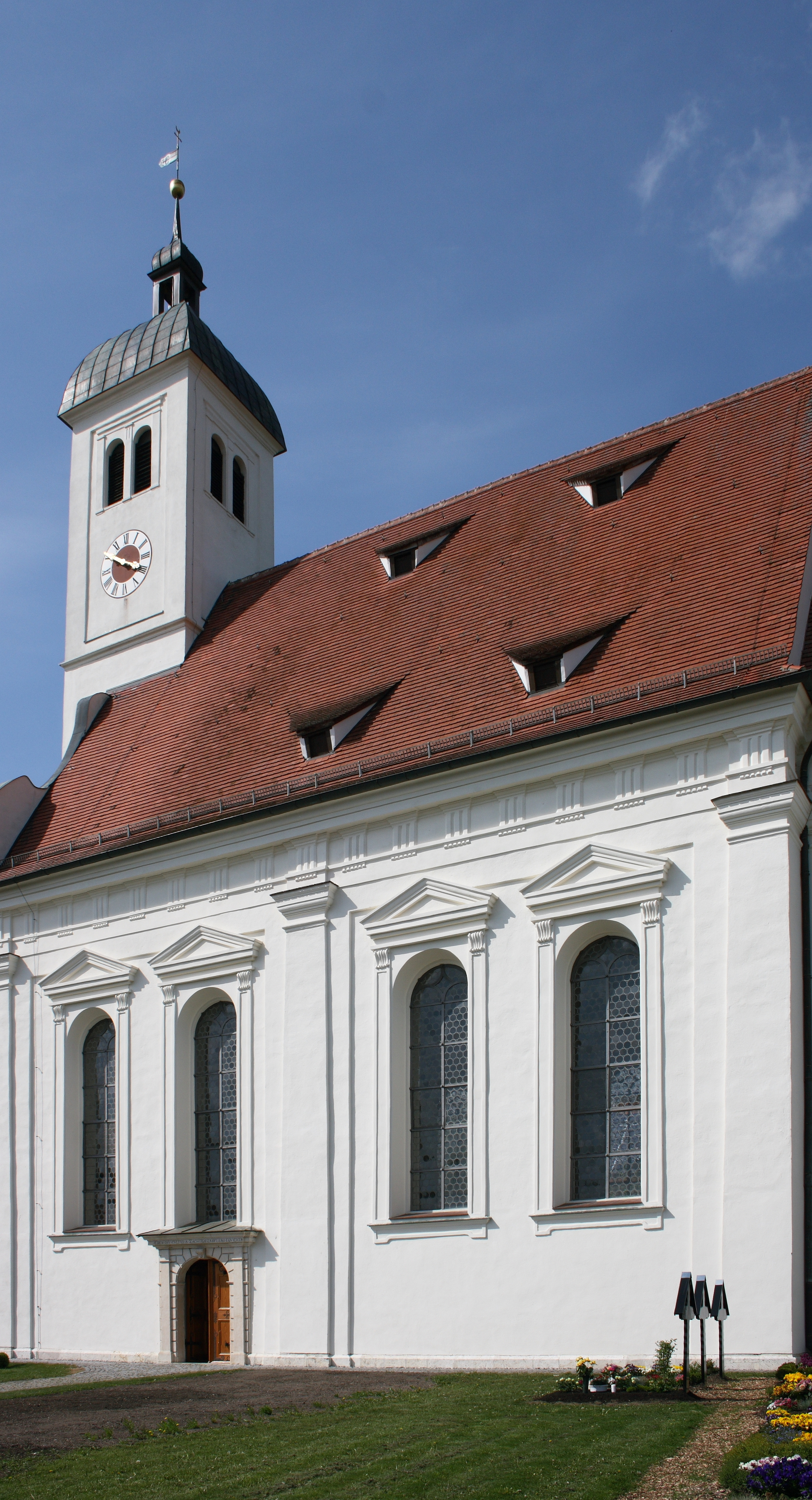 Evangelisch-lutherische Dreifaltigkeitskirche in Haunsheim, einer Gemeinde im Landkreis Dillingen an der Donau (Bayern), Ansicht von Süden